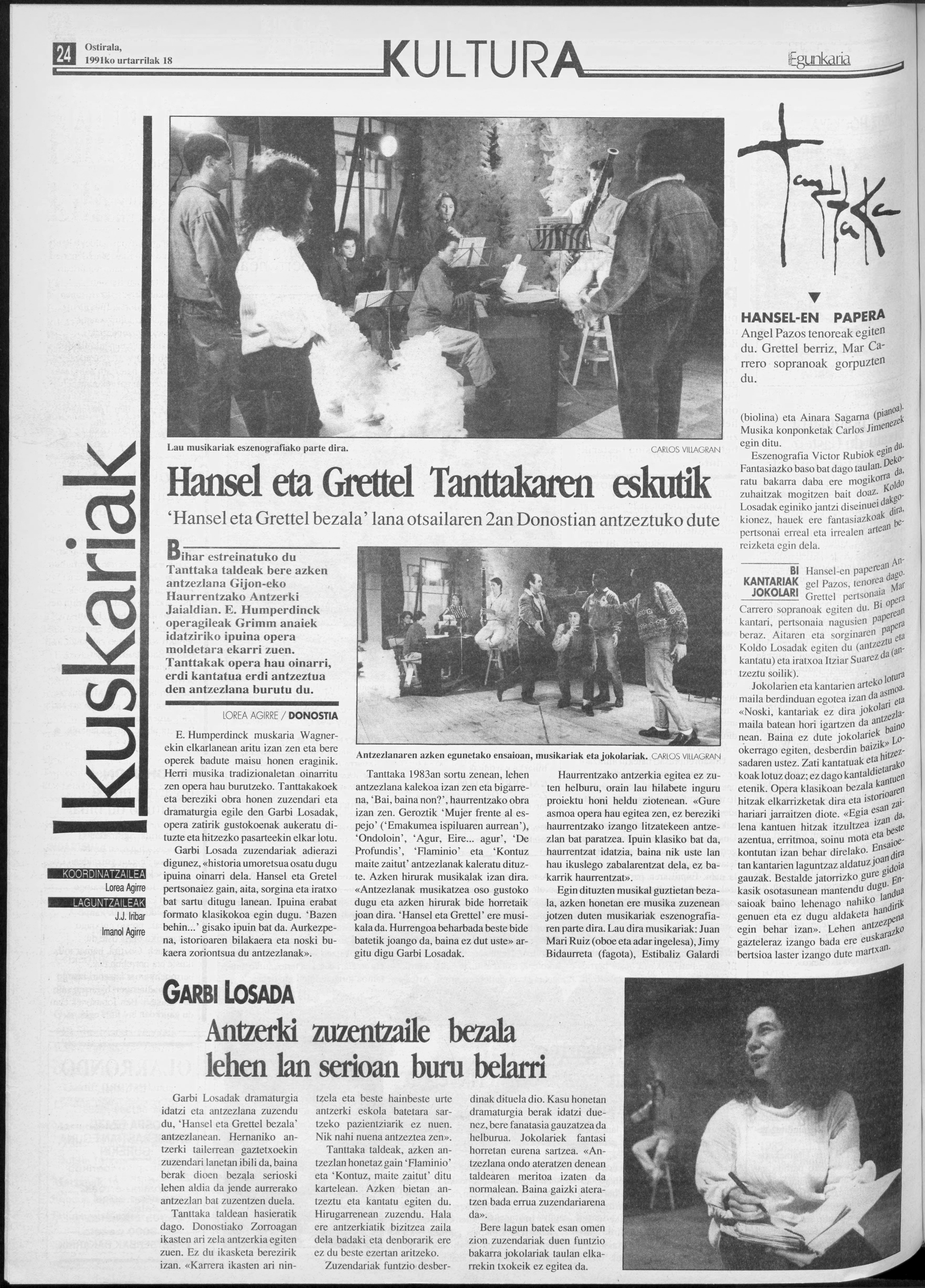 TTanttaka taldearen Eztei-gaua antzerki-lanaren zuzendari Garbi Losada (Egunkaria, 1991-01-18)